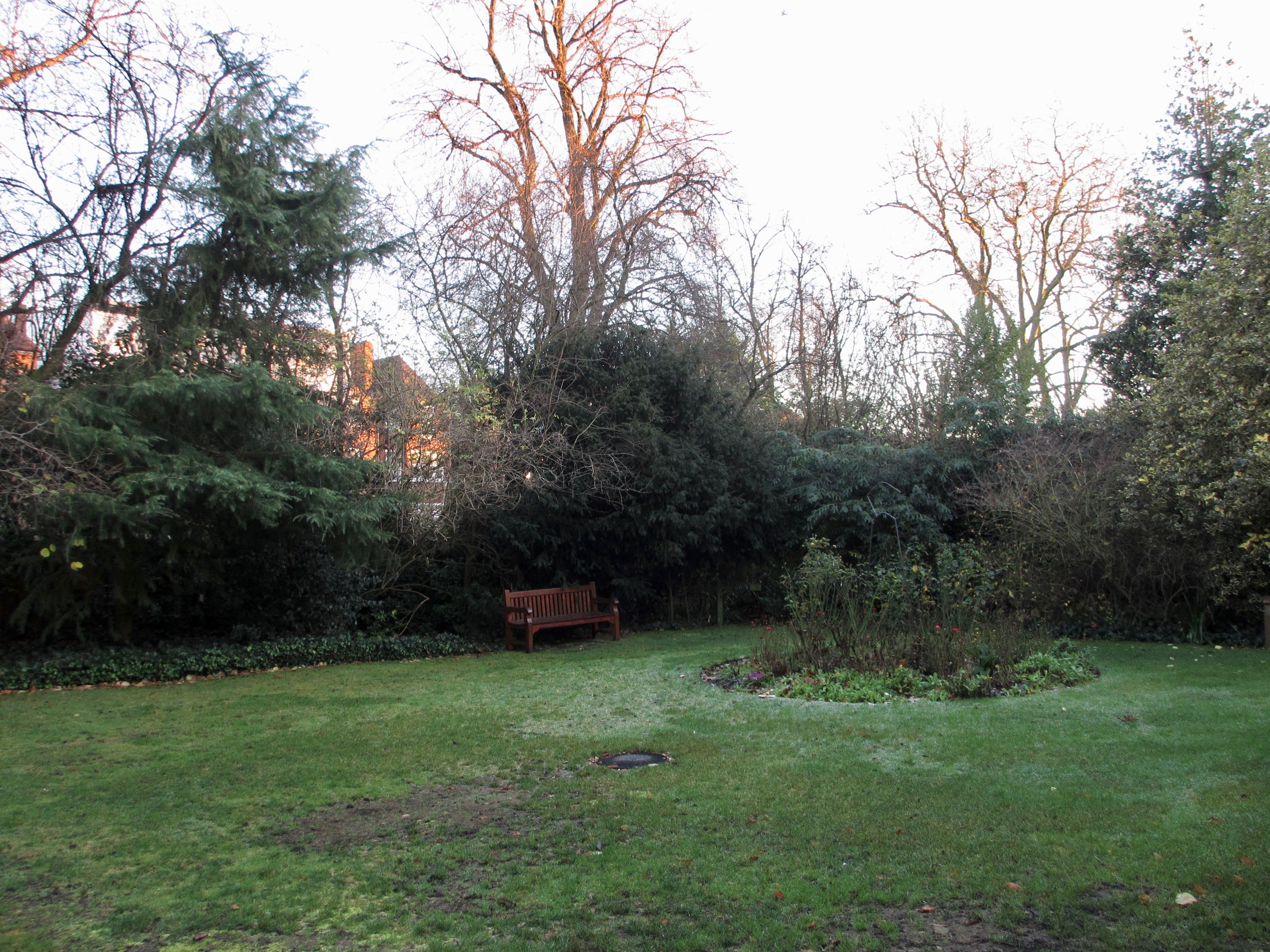 Freud Museum London - Garden in Winter